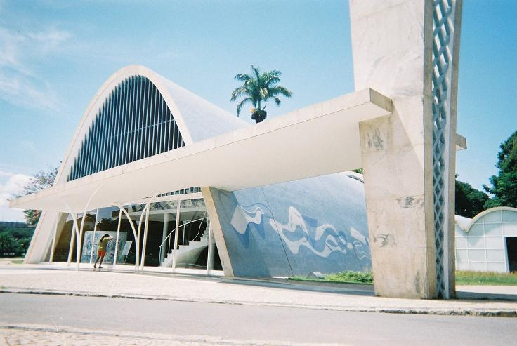 Црква светог Фрање у Пампуљи (четврт Бело Хоризонтеа). Рано дело Оскара Нимајера. Сликано фебруара 2008.